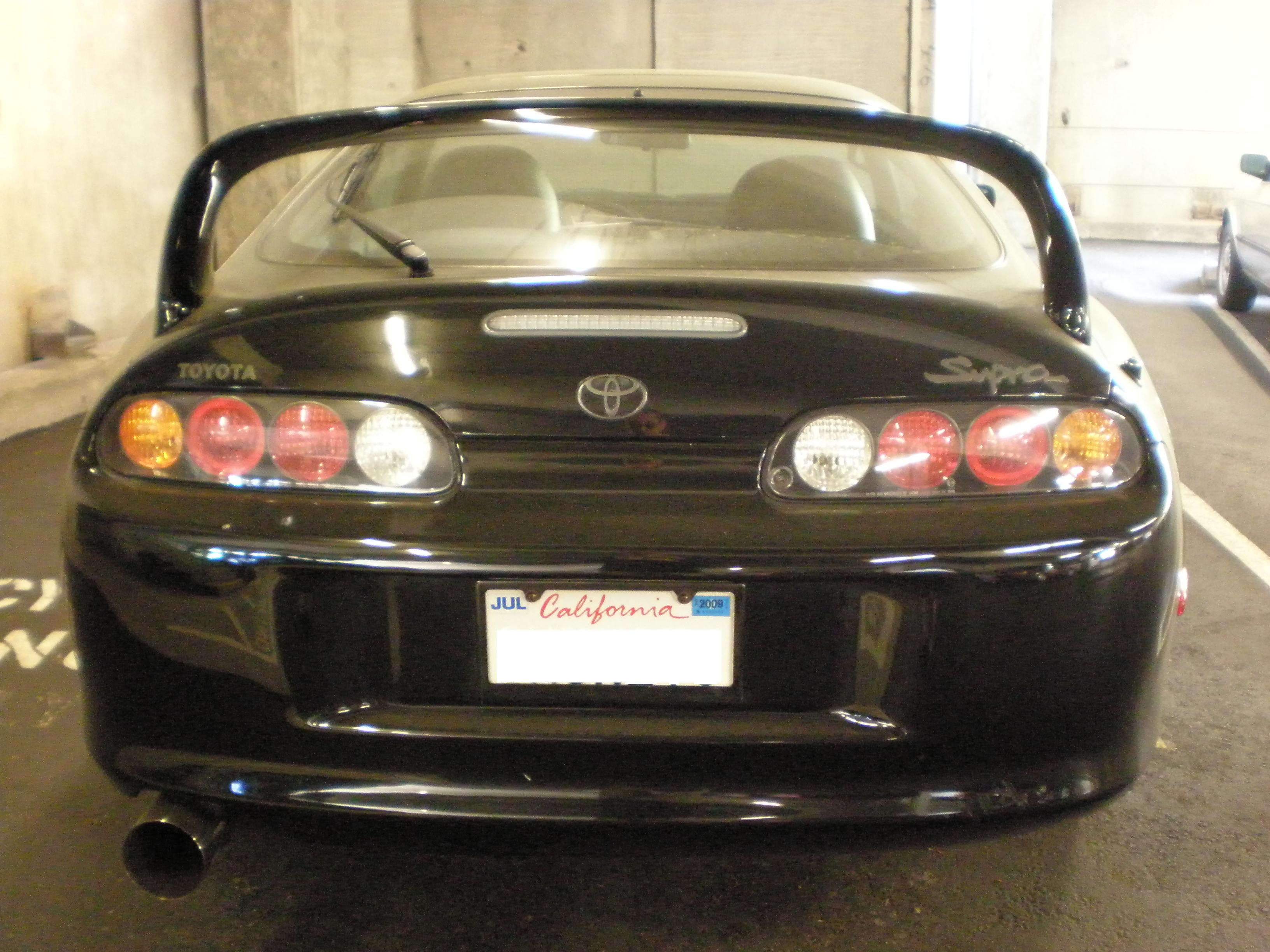 A Toyota Supra Mark IV.